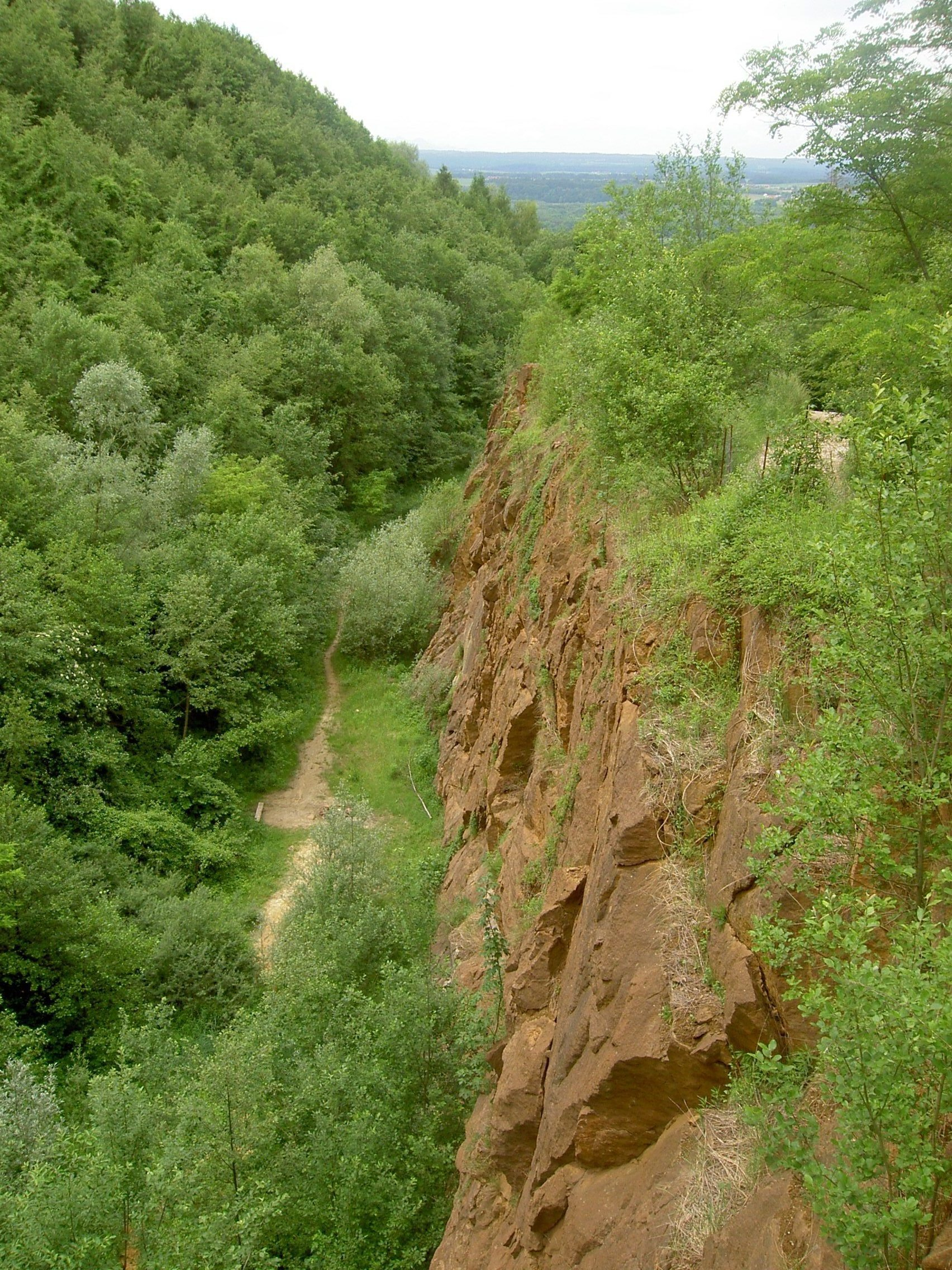 Ausblick vom geologischen Lehrpfad auf dem Haunsberg in der Gemeinde Nußdorf am Haunsberg im Norden des Bundeslandes Salzburg (Bezirk Salzburg-Umgebung).